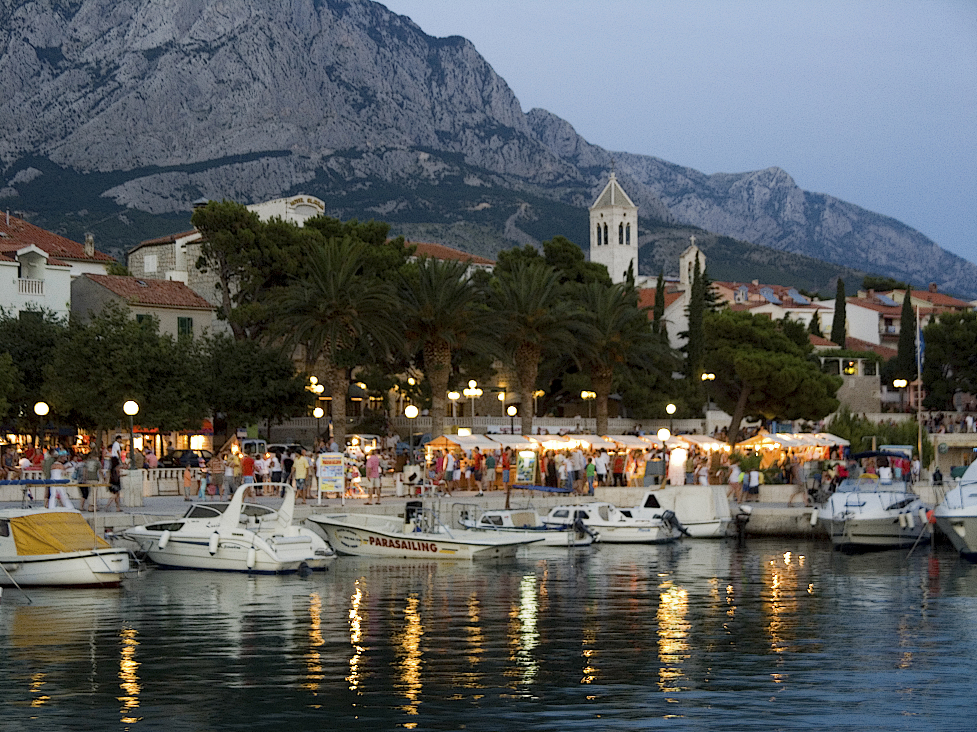 Хорватия, Башка Вода, Набережная вечером